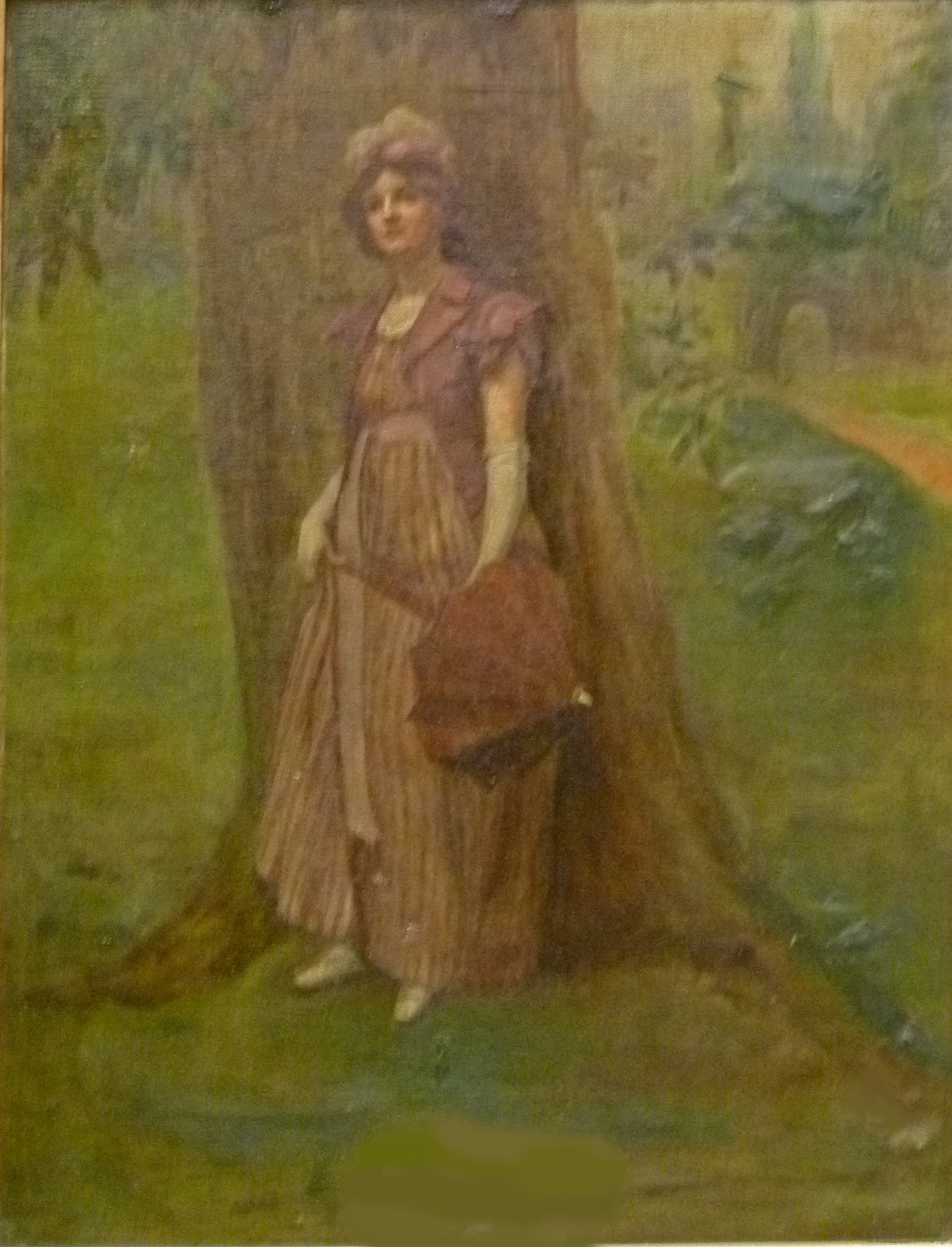 "Elegante jongedame pet parasol", olieverf op doek (46 x 36 cm) door de Belgische kunstschilder Charles Wildt (1851-1912); privébezit